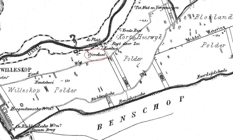 Boerderij Ojerslust op oude kaart van Willeskop. 1870 Uitgave Hugo Suringar te Leeuwarden. Getekend door J. Kuijper. Vanwege de leeftijd is copyright verlopen en kan het in het publieke domein worden geplaatst.